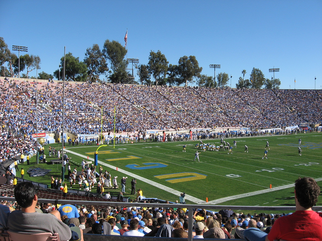 UCLA_vs_Oregon,_Pasadena,_2007